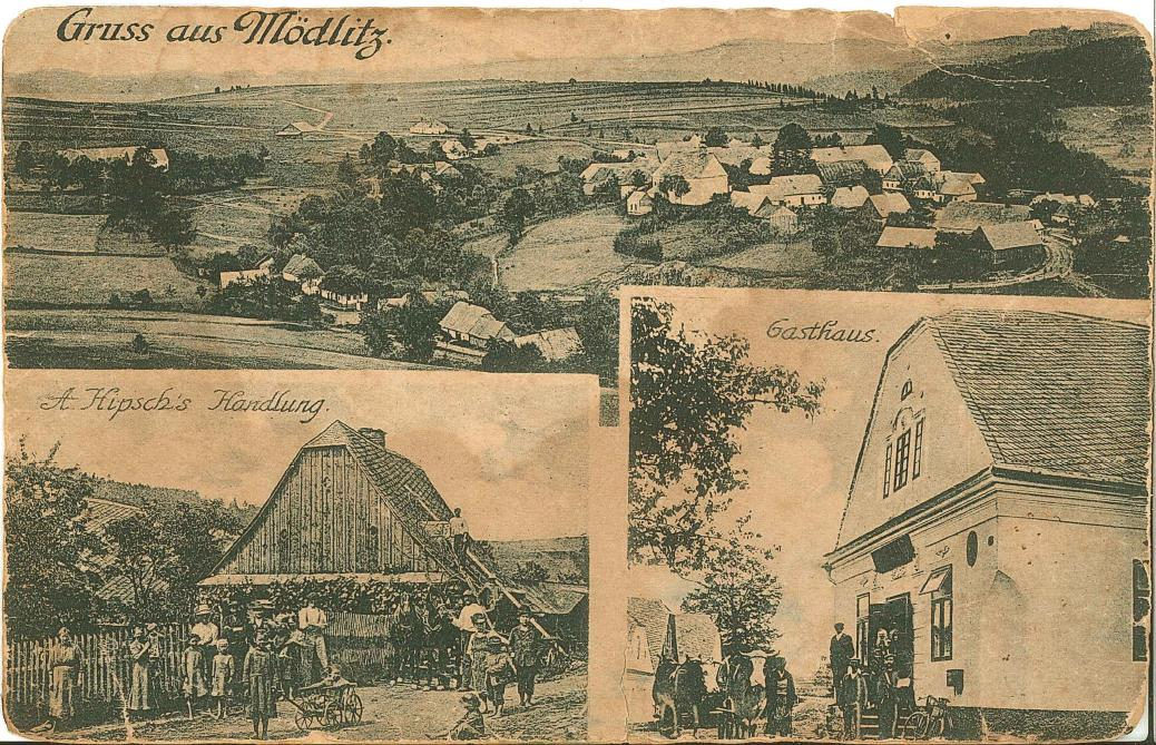 Postkarten aus Mödlitz von 1919, Ortsbild aus nördlicher Richtung, Kreislerei von Aloisia Hipsch, Gasthaus